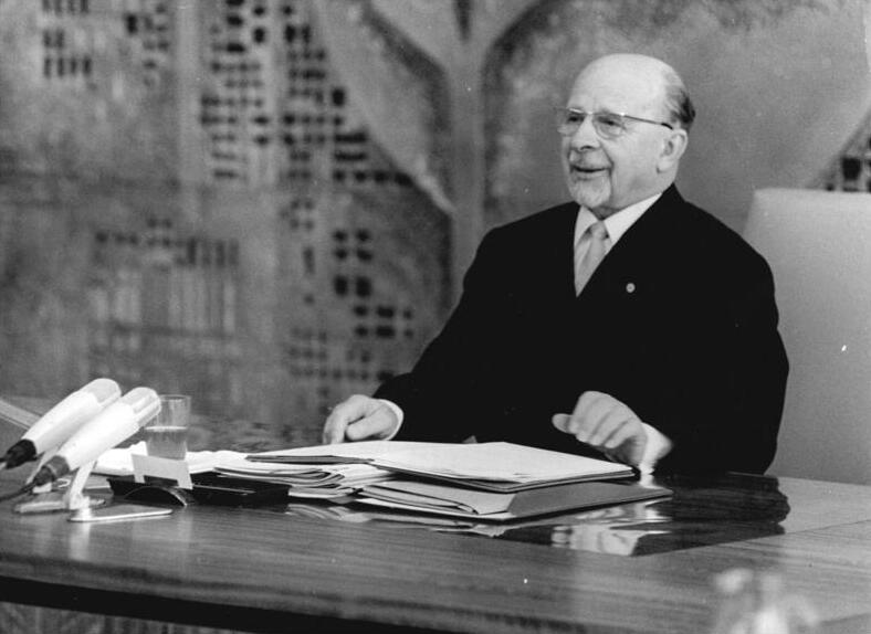 Zentralbild Junge 20.9.1968 bgm-odo Berlin: 11. Sitzung des Staatsrates der DDR am 20.9.68. Der Staatsrat der DDR trat am 20.9.68 unter Vorsitz von Walter Ulbricht zu seiner 11. Sitzung zusammen. Im Mittelpunkt der Beratung im Amtssitz des Staatsrates am Marx-Engels-Platz steht ein Beschlußentwurf über "Die Aufgaben der Körperkultur und des Sports bei der Gestaltung des entwickellten gesellschaftlichen Systems des Sozialismus in der DDR". Auf unserem Foto: Der Vorsitzende des Staatsrates der DDR, Walter Ulbricht, nahm zu Beginn der Sitzung das Wort zu einer Eröffnungsansprache."